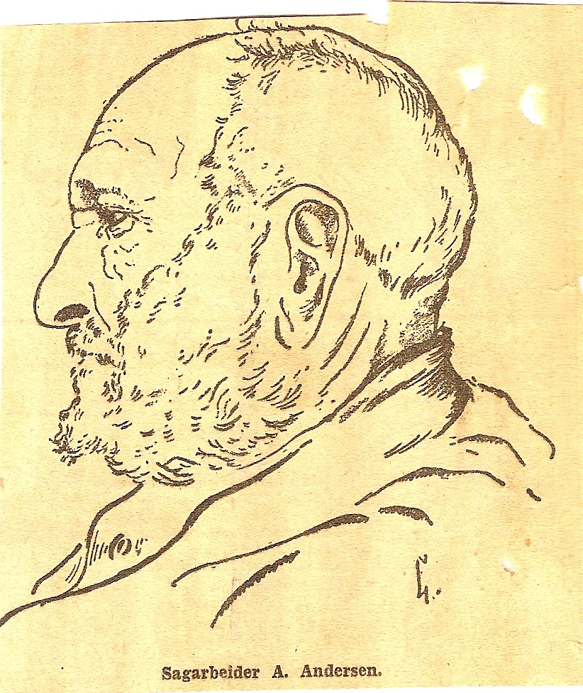 Portrett